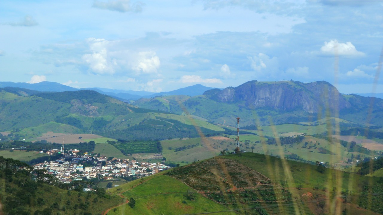 Pedralva - Minas Gerais, Brasil e Pedra do Pedrão ao fundo no dia 23 de Janeiro de 2011.